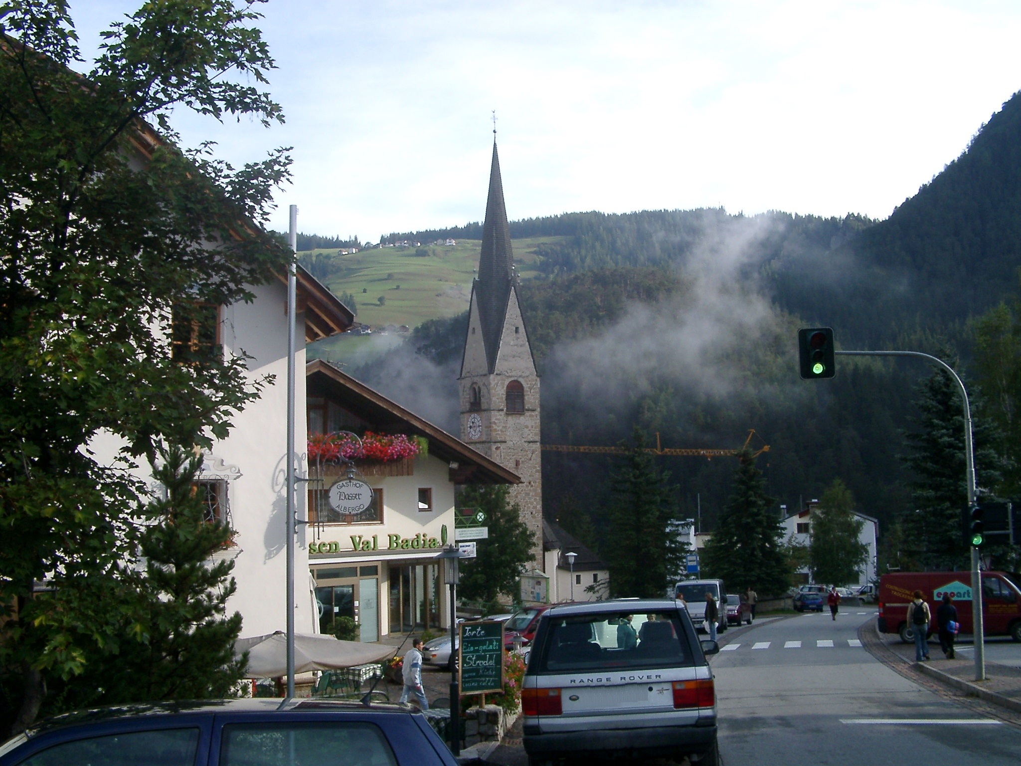 Ortskern Sankt Martin in Thurn